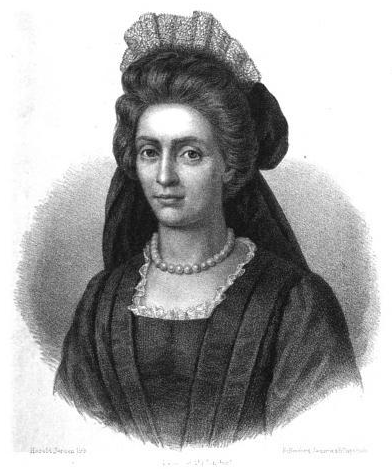 Anna Colbjørnsdatter (d. 1736)